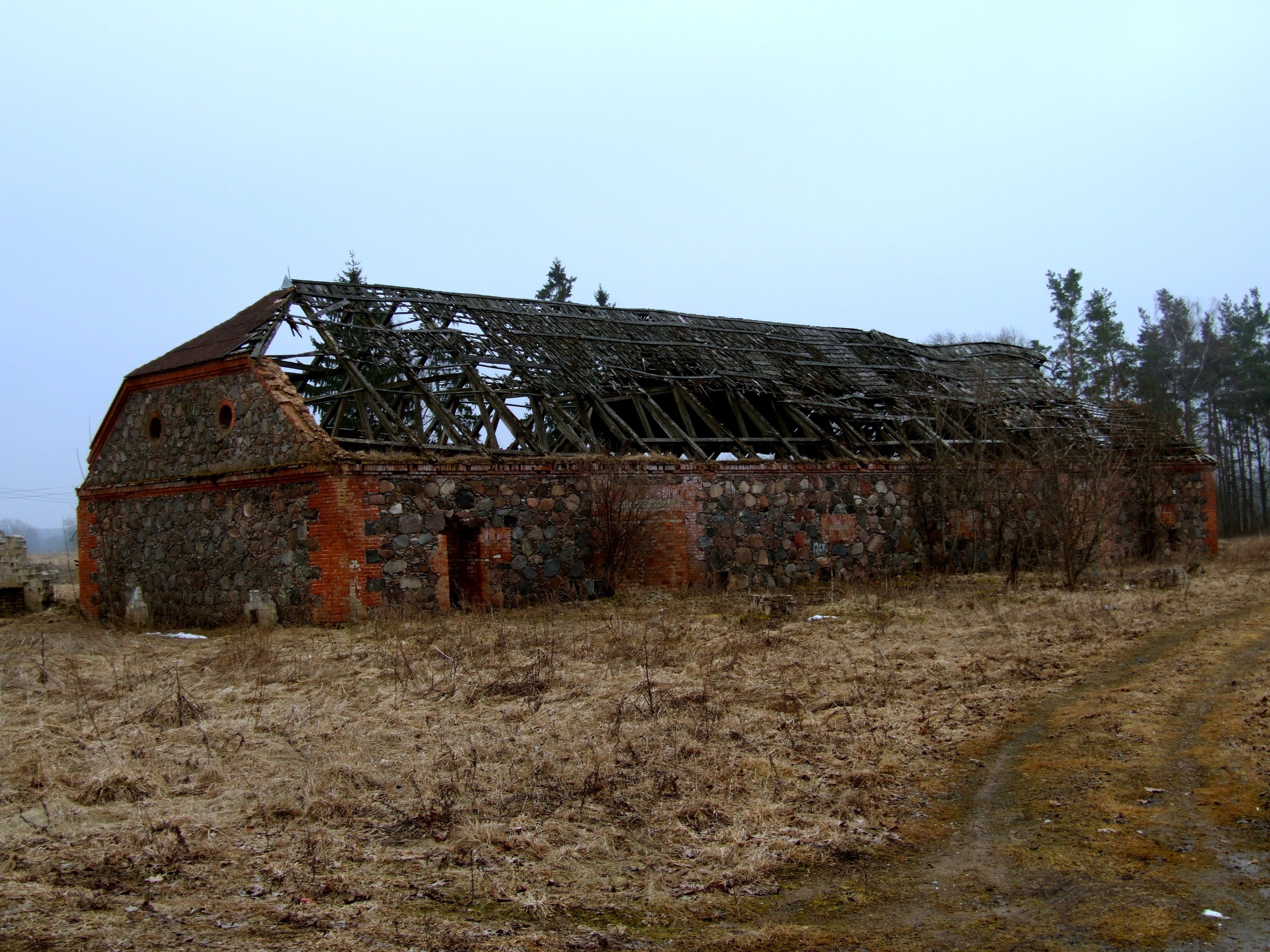 Pagružuvys manor complex